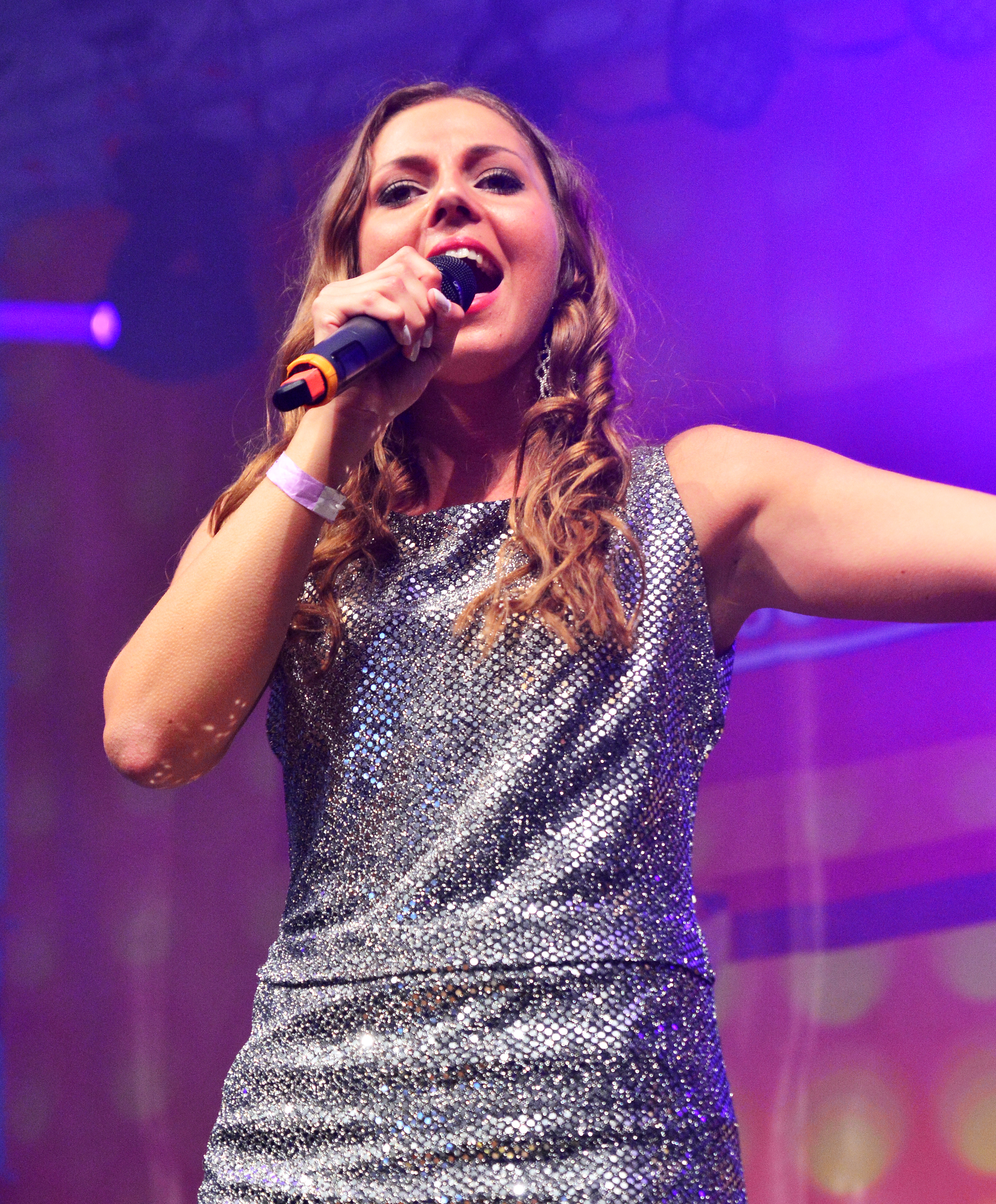 Jessica-Sarah Thoma beim Schlagermove 2015 in Hamburg